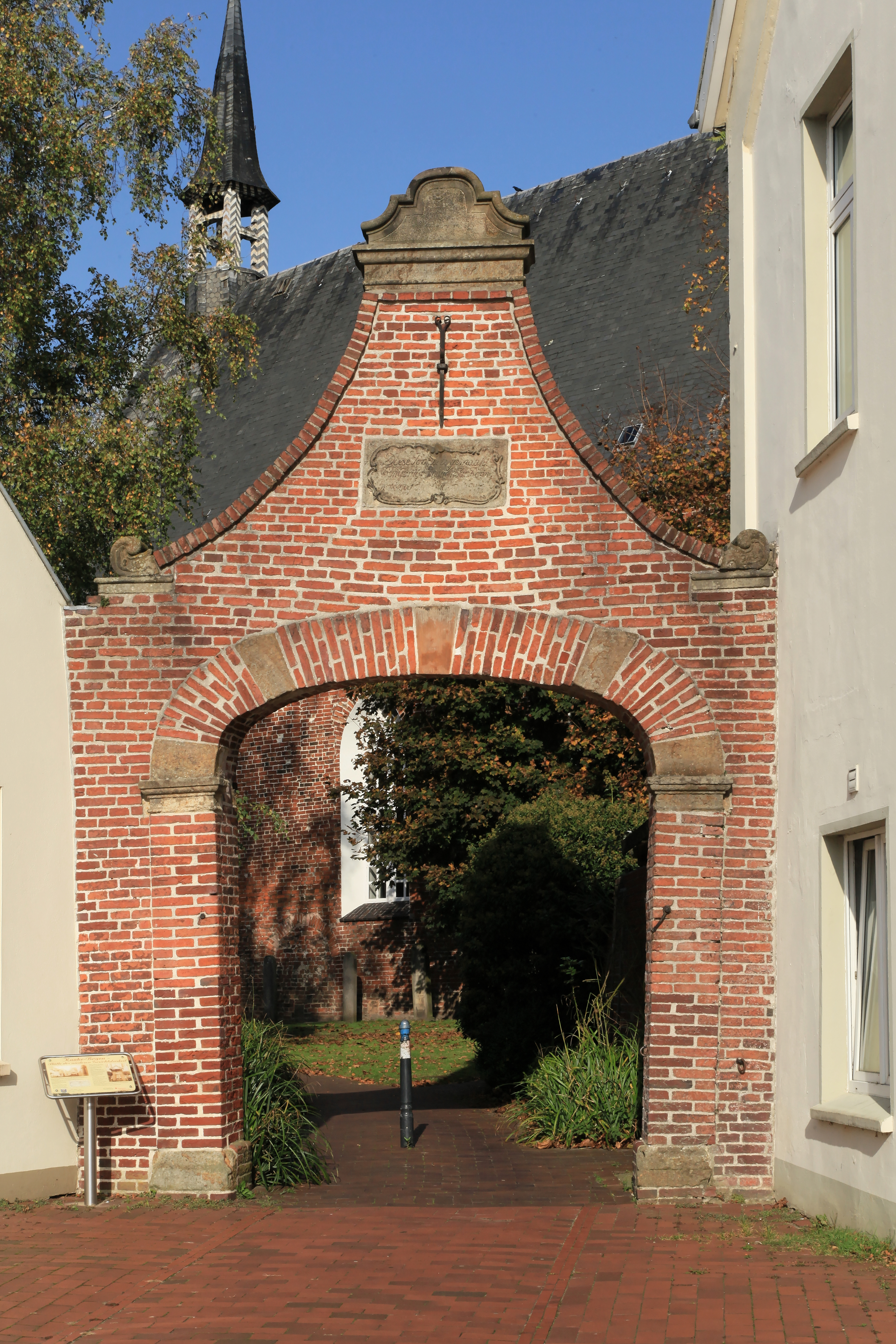 Kaakebogen, Kaakeplatz / Norderstraße in Weener